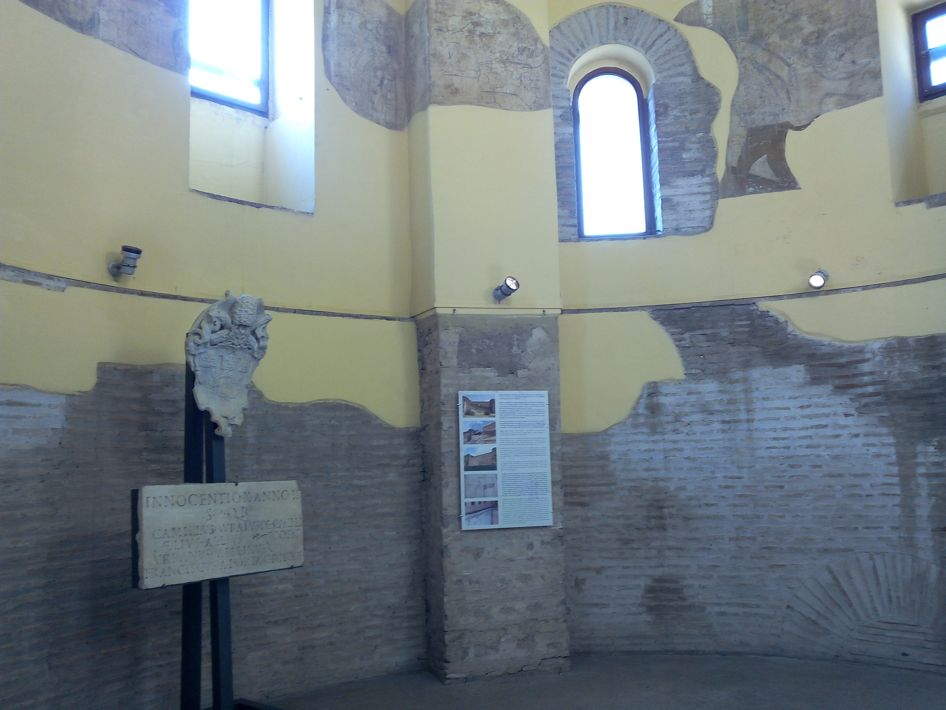 L'Associazione Culturale Visure Acatastali in visita al Museo delle Mura il 10 marzo 2015